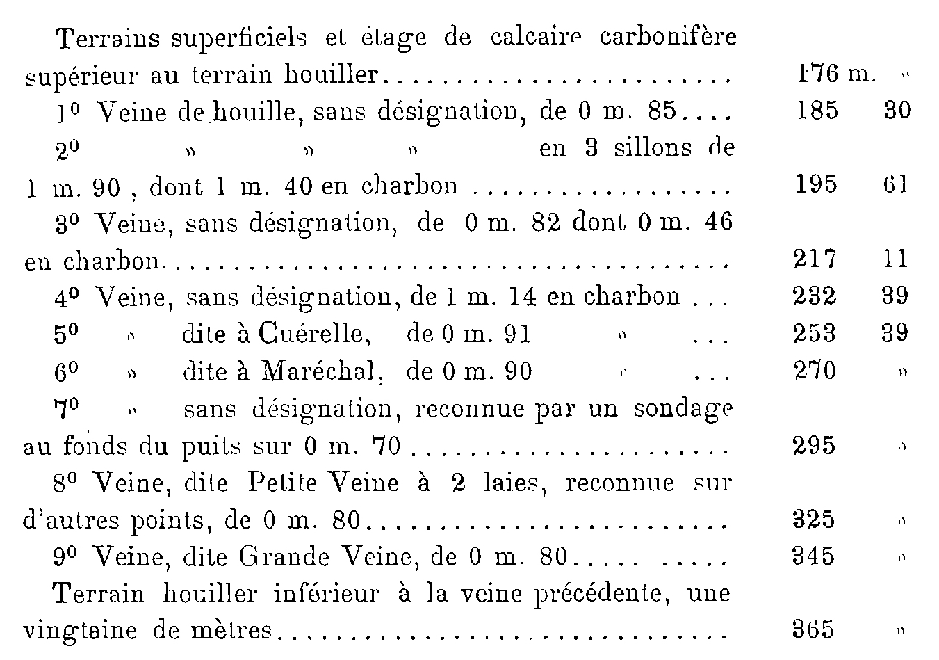 Coupe verticale aux alentours du puits La Providence de la Compagnie des Charbonnages de Réty, Ferques et Hardinghen